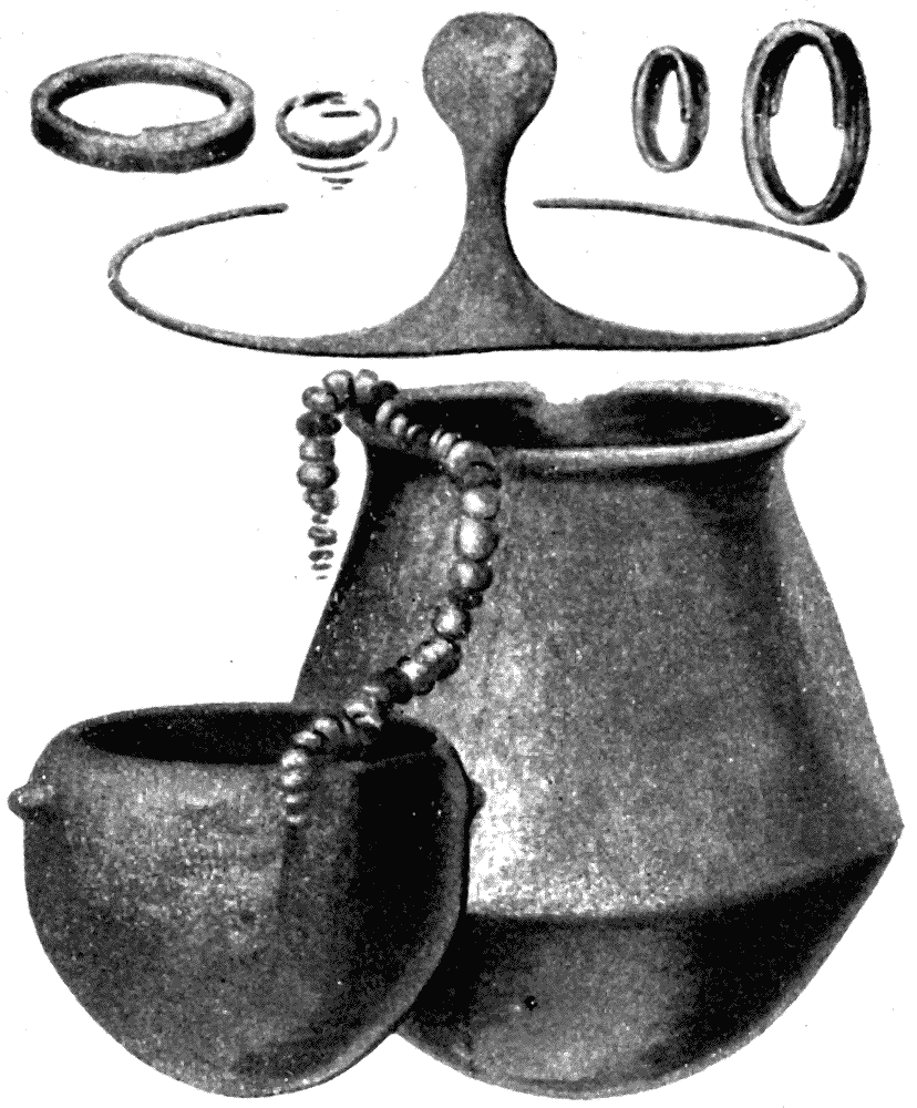 Ajuar funerario de la cultura de El Argar, Bronce Pleno en el sur de España